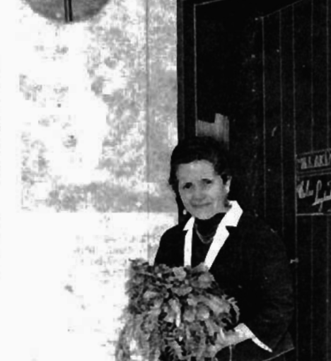 Celia Leyton retratada por la Revista En Viaje de junio de 1962, N°344.